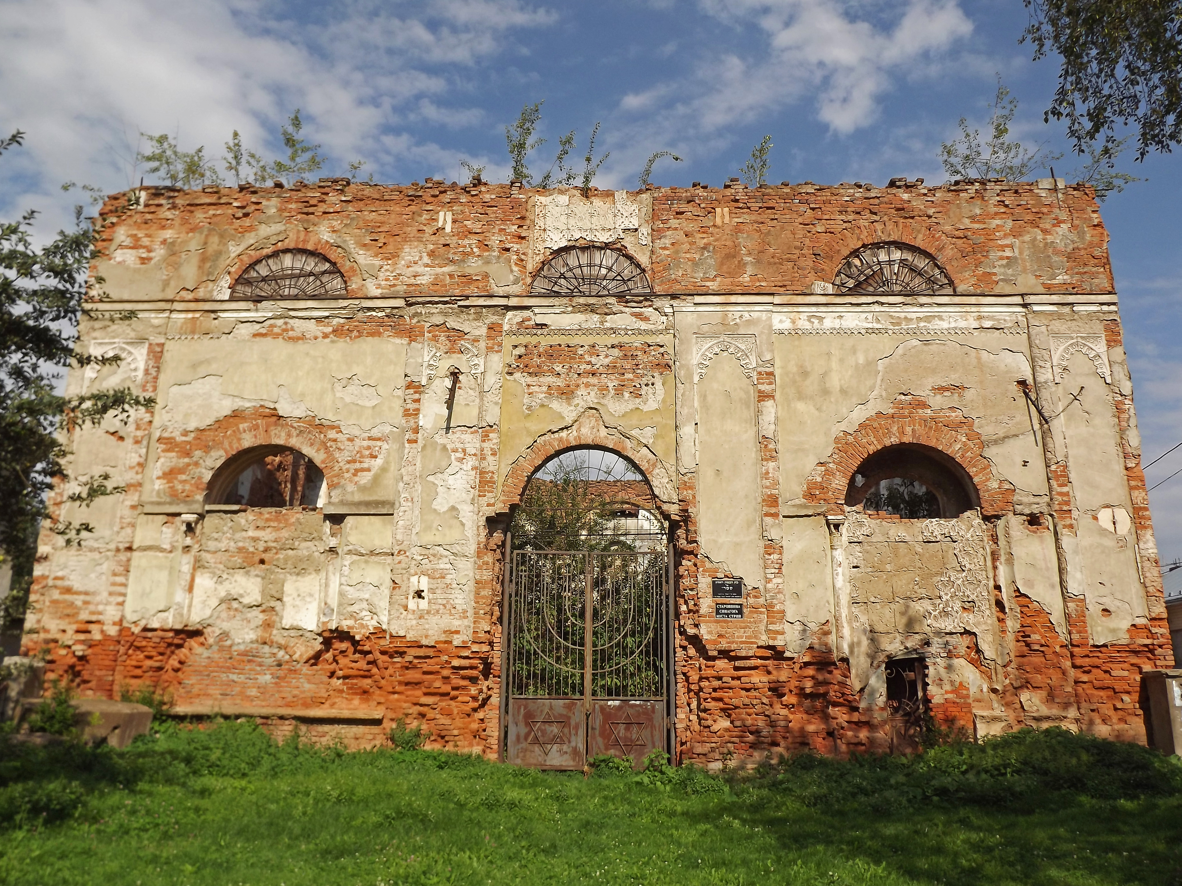 Руїни Великої синагоги, Стрий, вул. Міхновського, 5